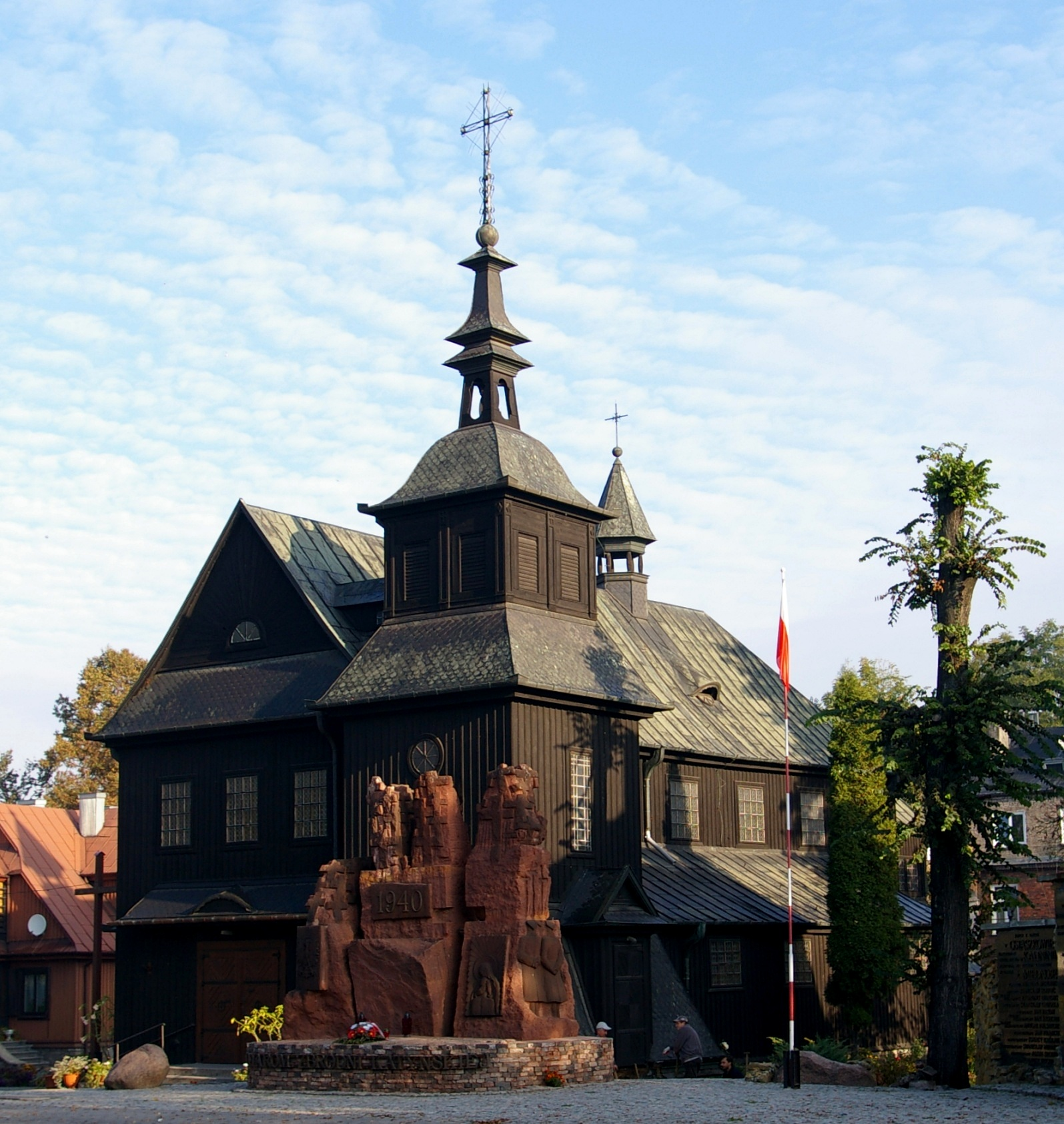 Kościół Najświętszego Serca Jezusowego w Ostrowcu Świętokrzyskim